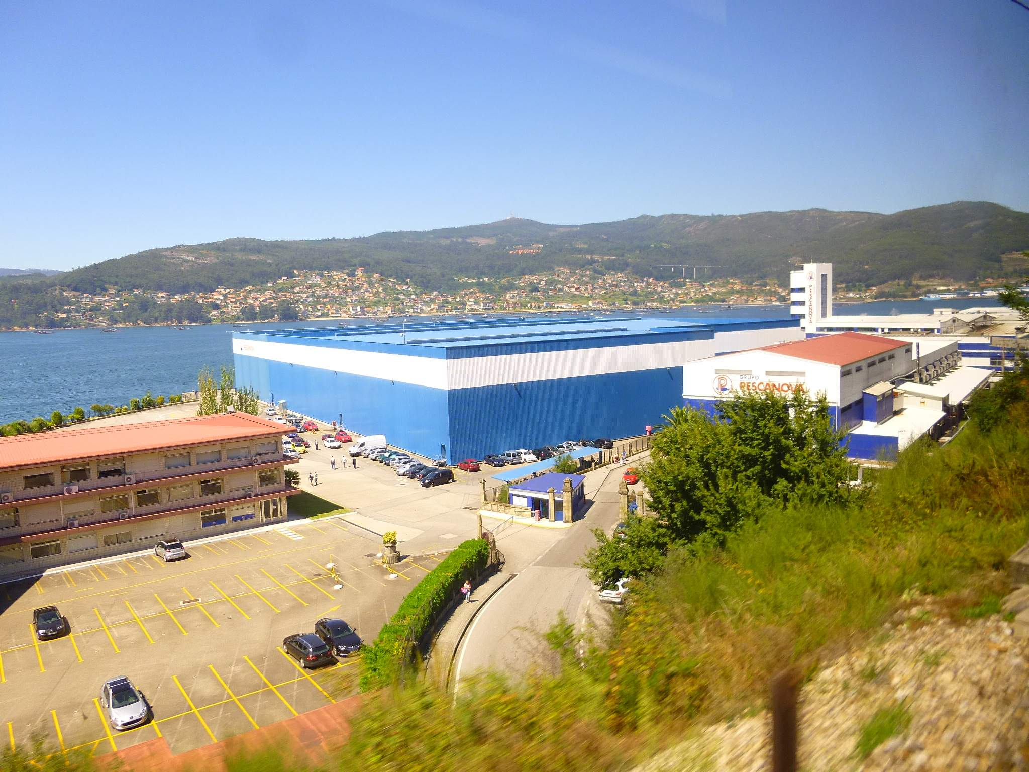 Vigo - Puerto comercial